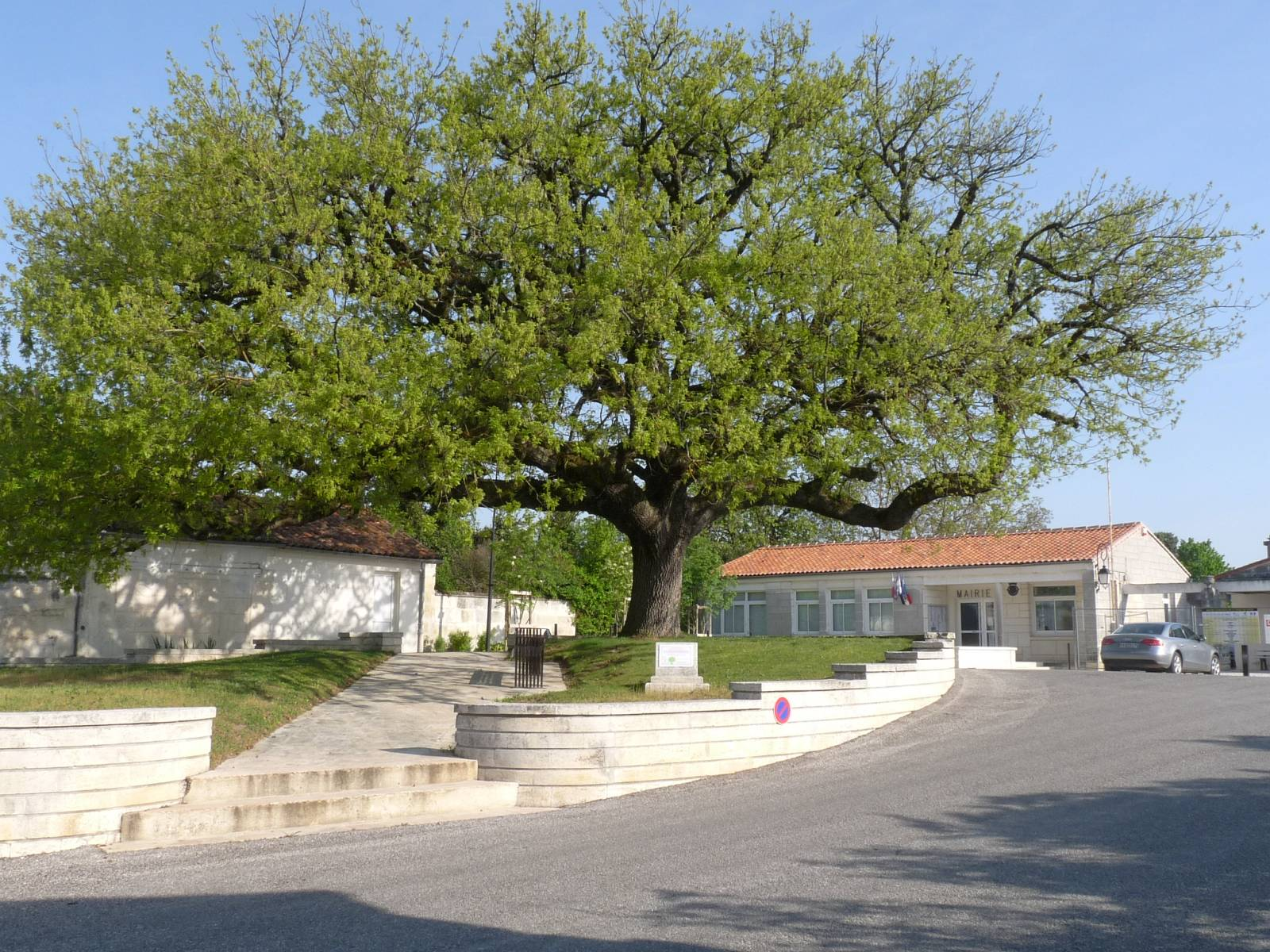 Saint-Même-les-Carrières (Charente, Poitou-Charentes, France) : Vieux chêne près de la mairie.